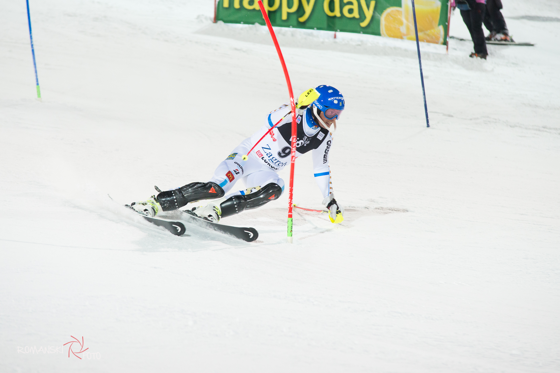 MYHRER Andre